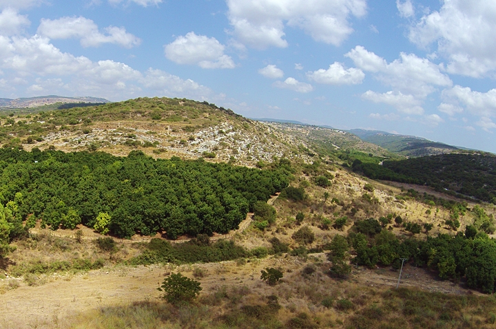 תל עבדון מבט מצד מערב